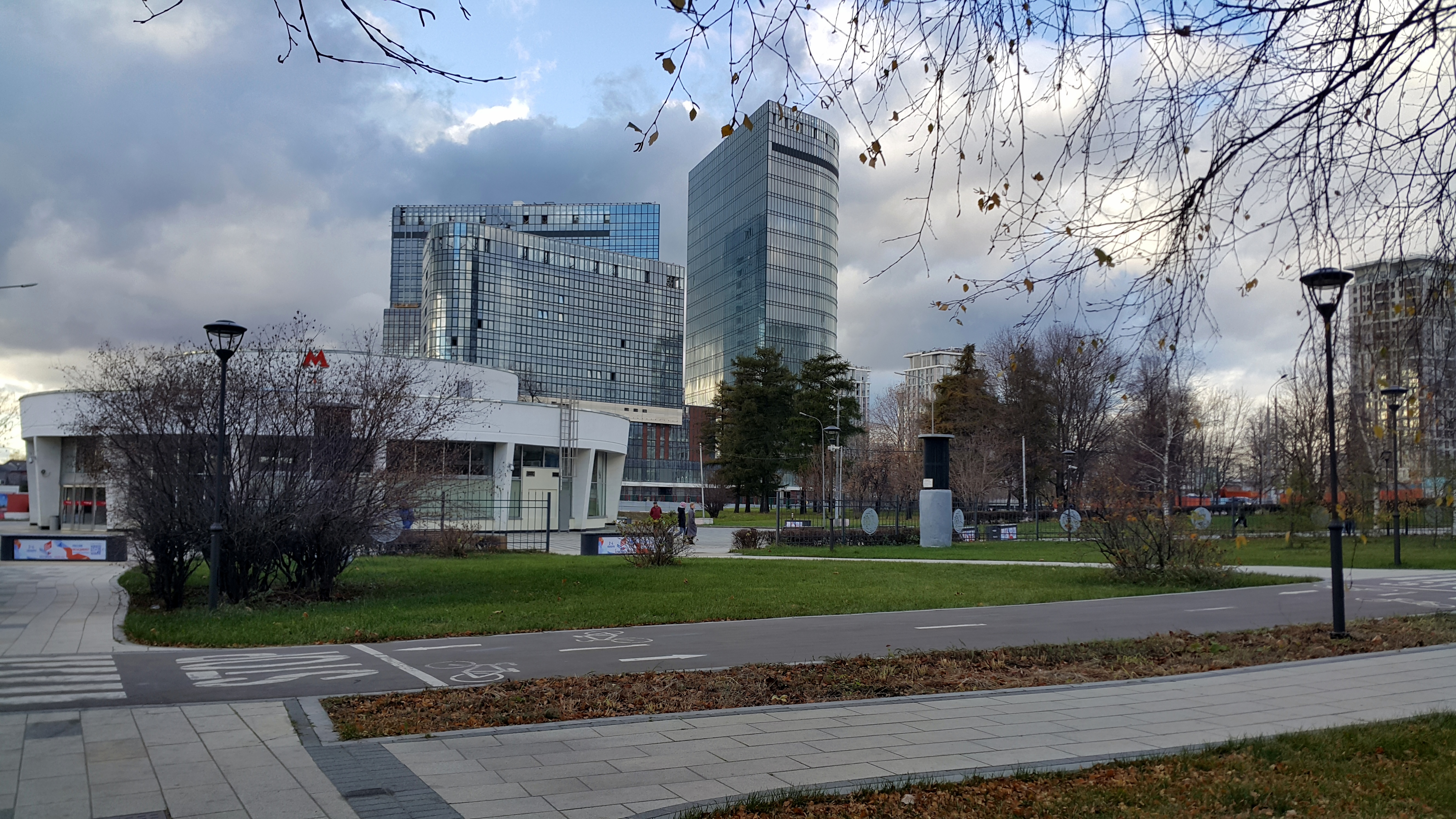 Южный вестибюль станции метро «Ботанический сад» у входа в парк «Сад будущего», Москва, Россия; дата/время съёмки: 28 октября 2019 г., 14:50:46.